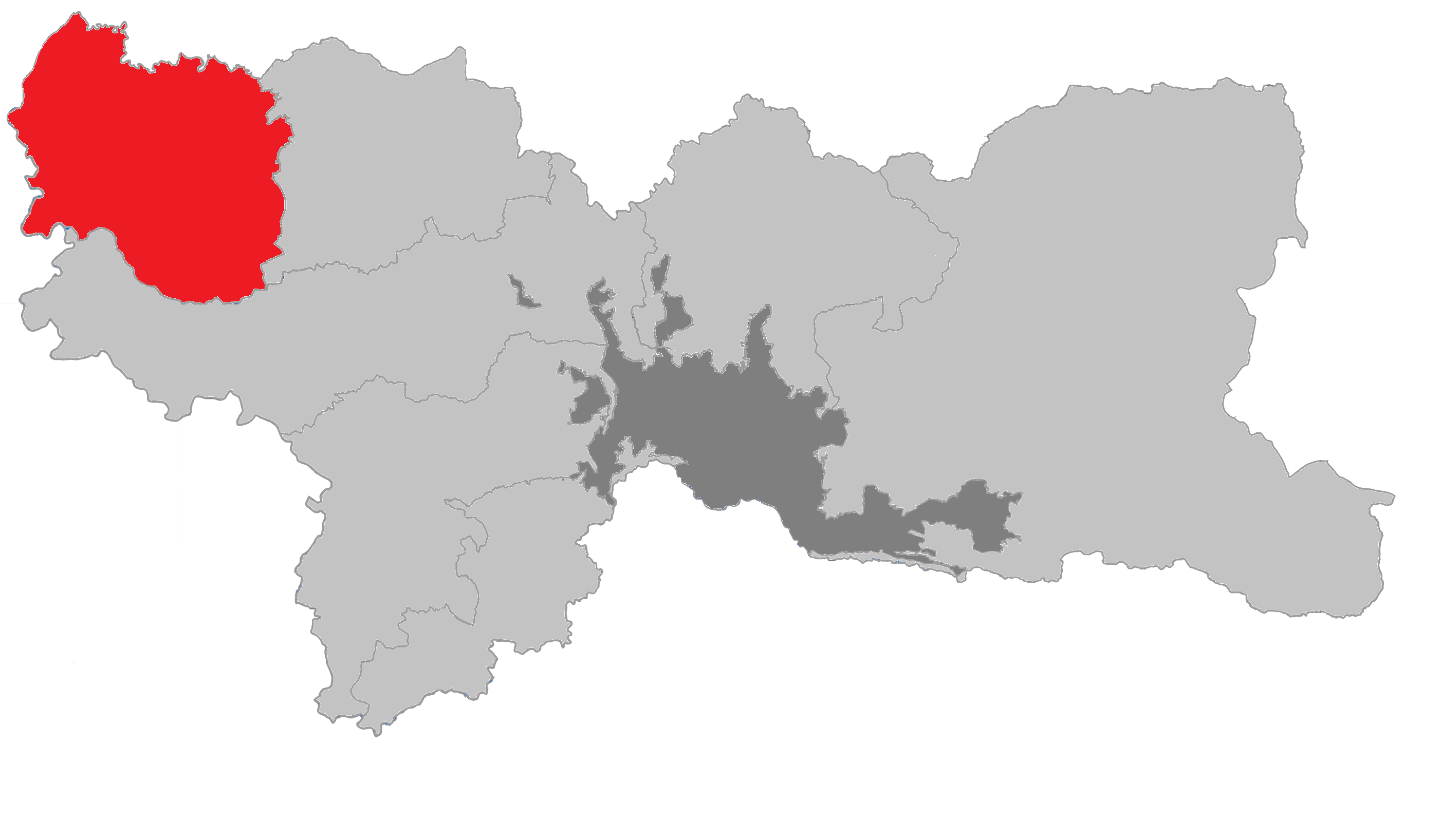 corregimiento de manizales